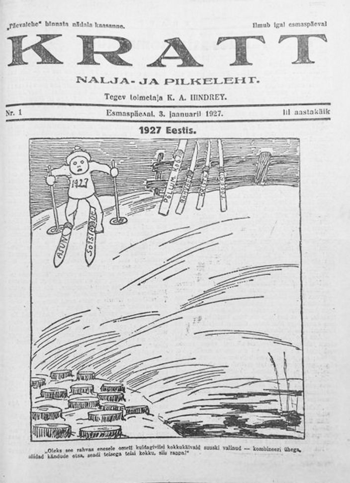 Kratt, esileht